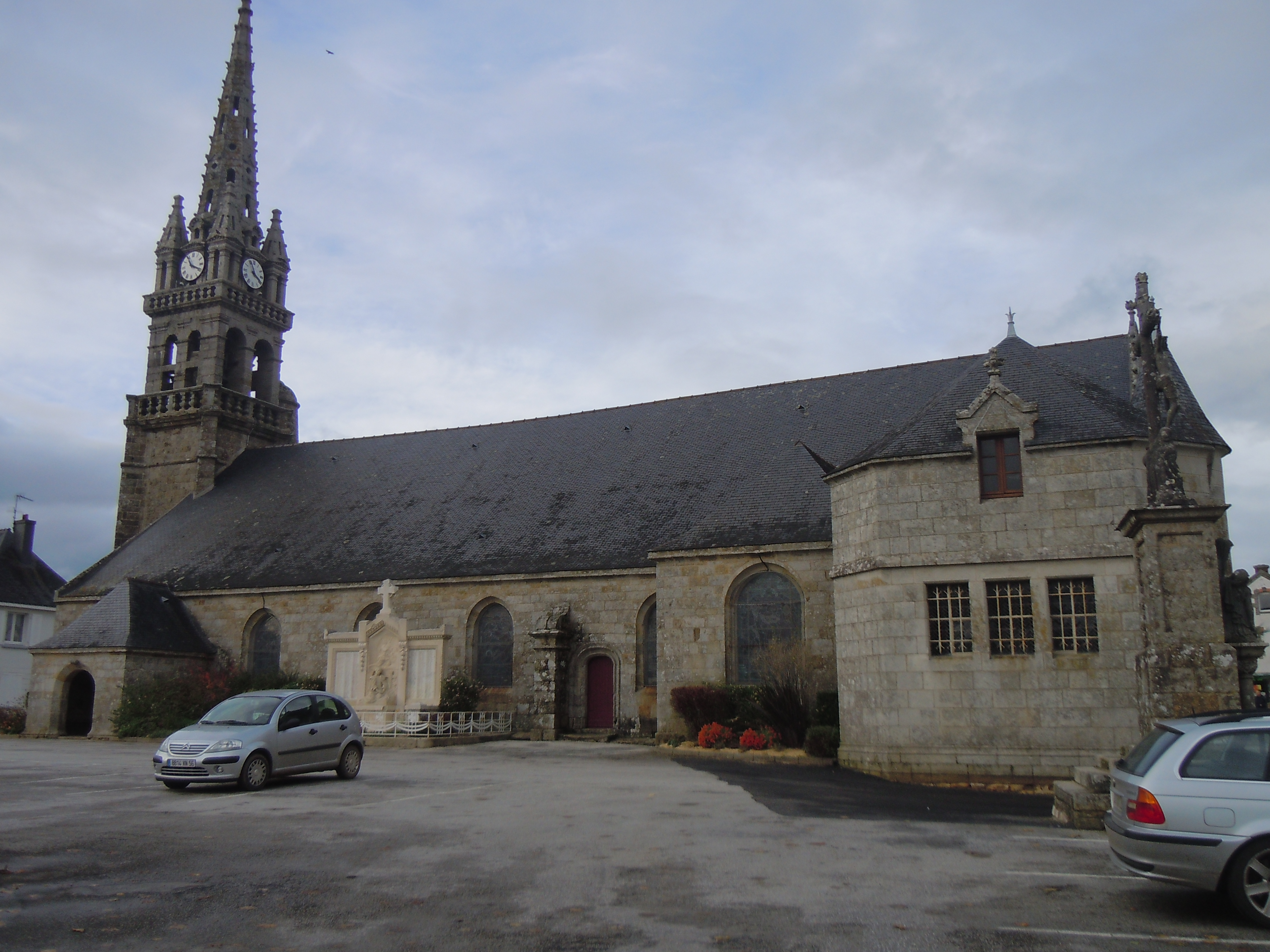 vue de la façade méridionale de l'église paroissiale Saint-Pierre et Saint-Paul de Guiscriff (Morbihan)